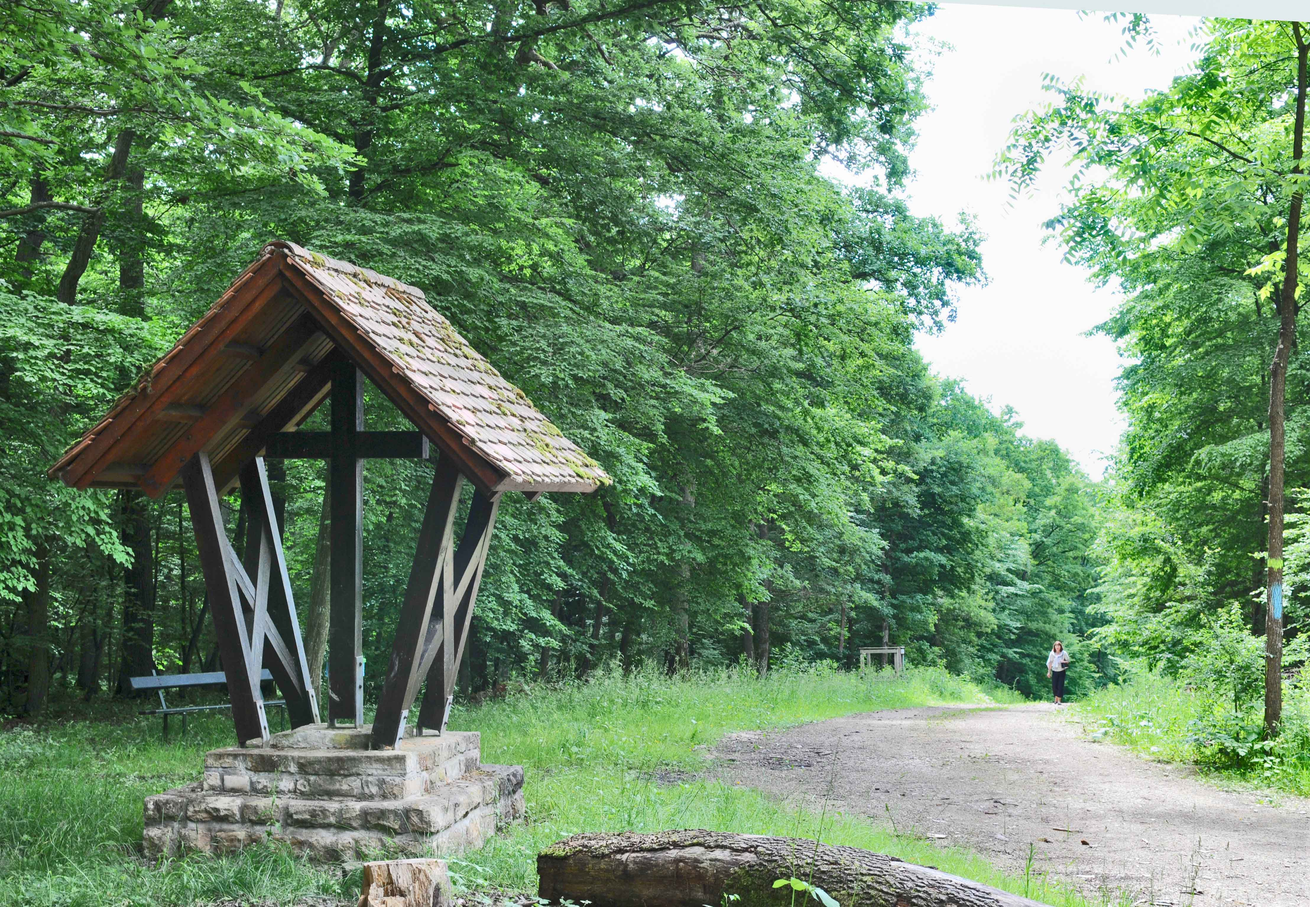 D'Kräiz am Buusserbësch, Richtung Bus gekuckt. Ronnebeemchen + Ronnebeemchen + Ronnebeemchen